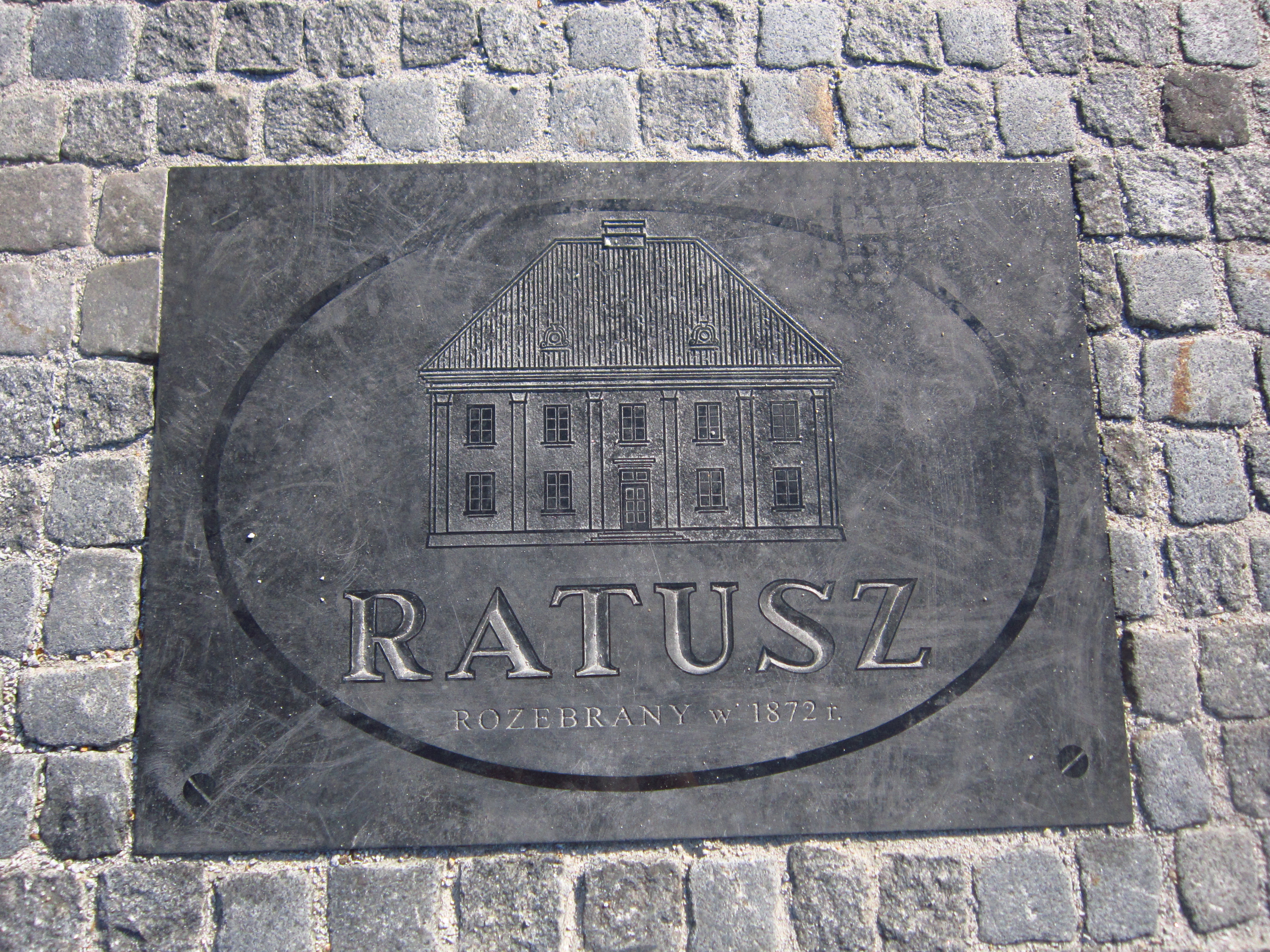 Tablica Pamiątkowa leżąca w miejscu, gdzie leżał Ratusz miejski, zburzony w 1872 roku.